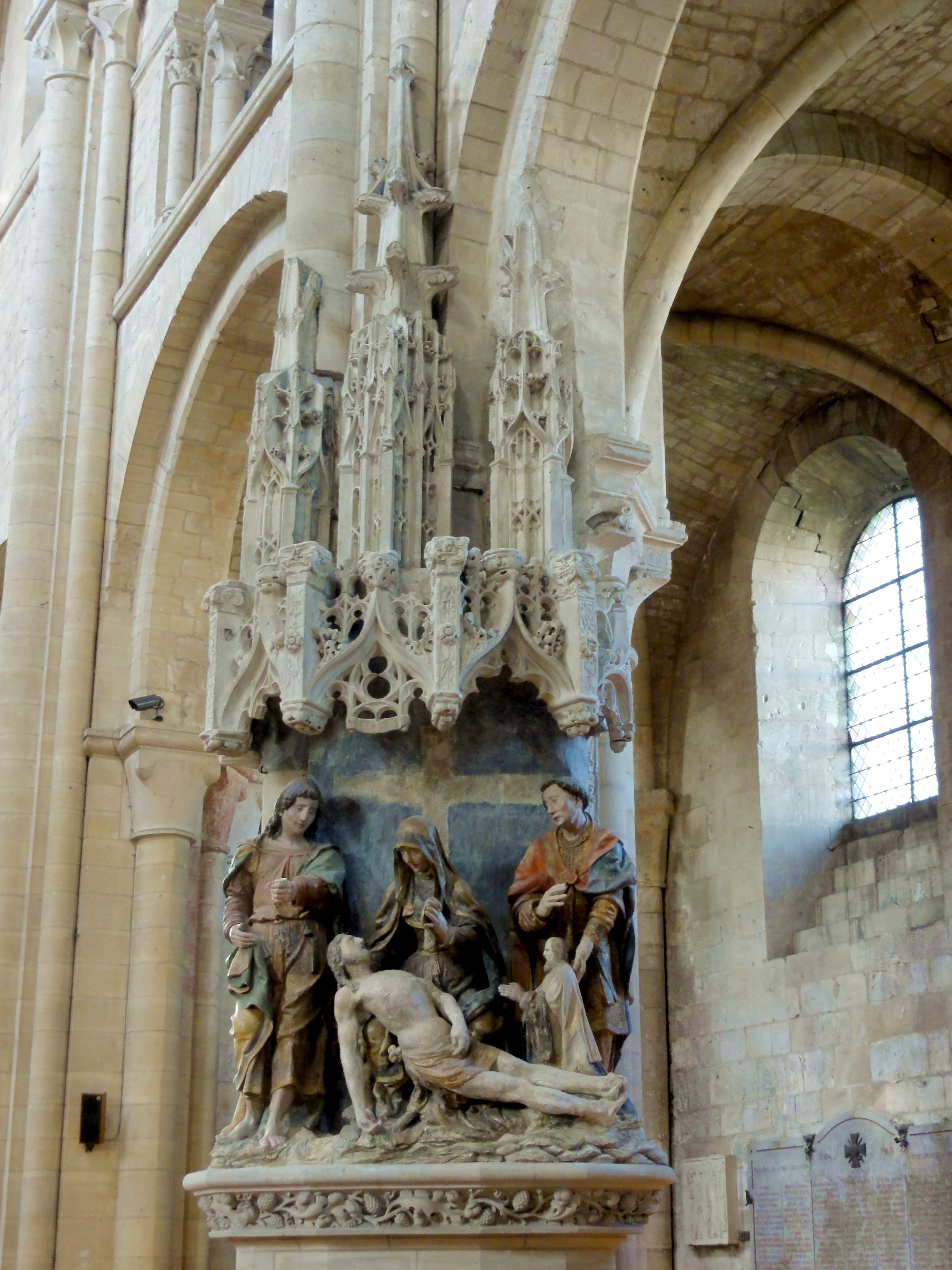 Pietà dans la nef.